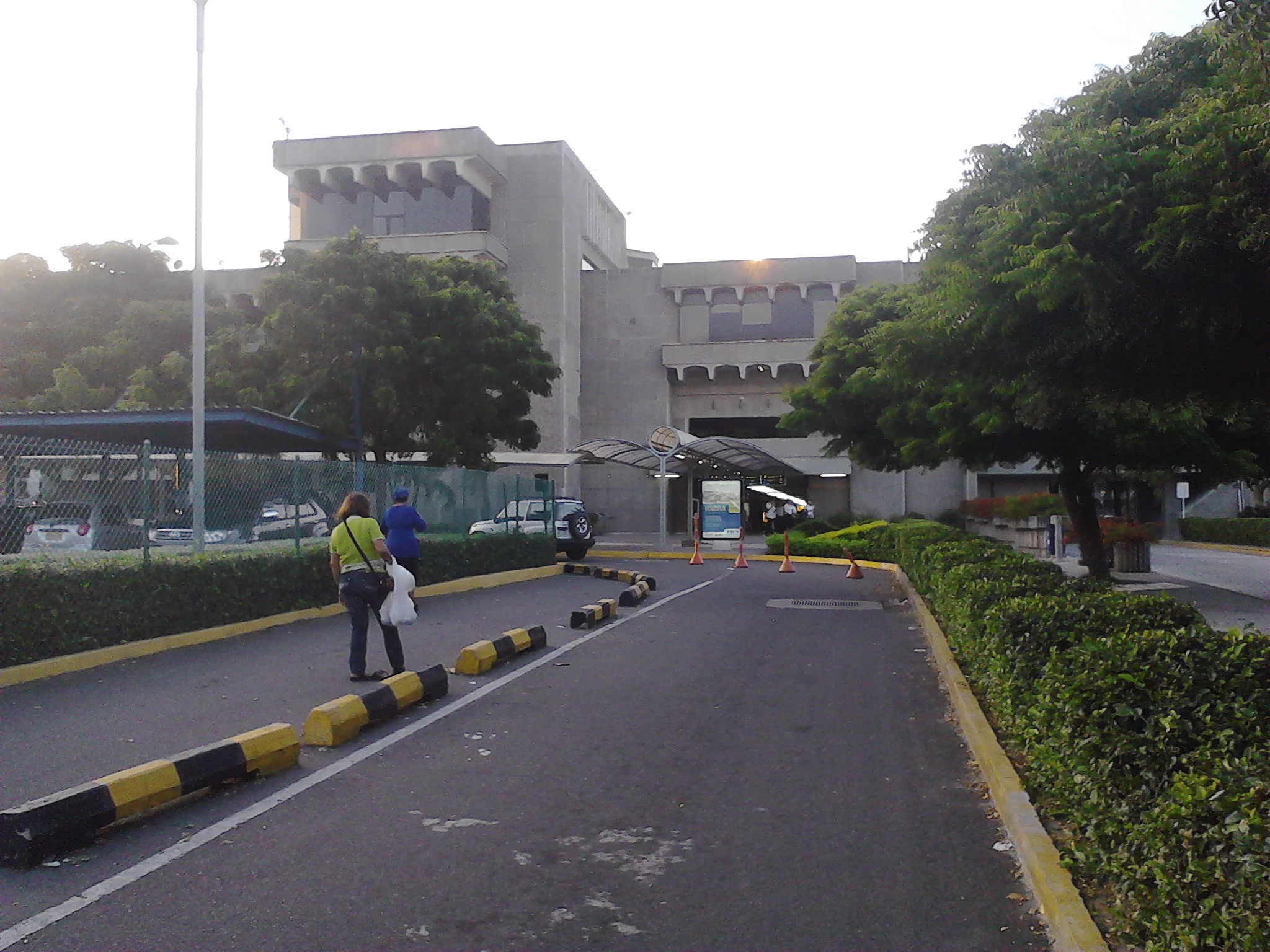 Soledad, Atlantico, Colombia